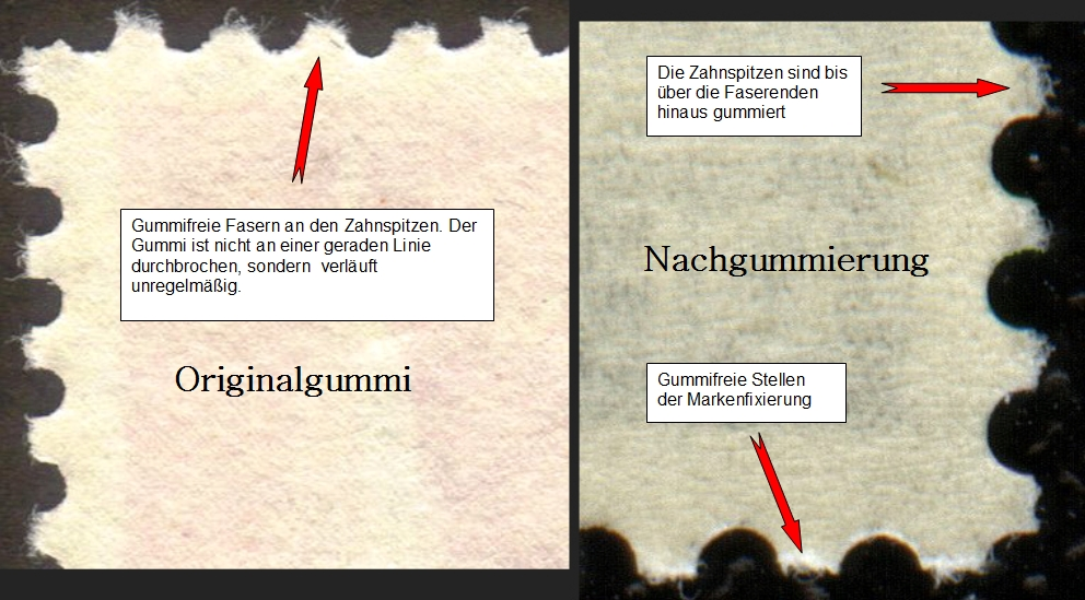 Vergleich einer Briefmarkenrückseite mit Originalgummi (links) und einer Nachgummierung (rechts).